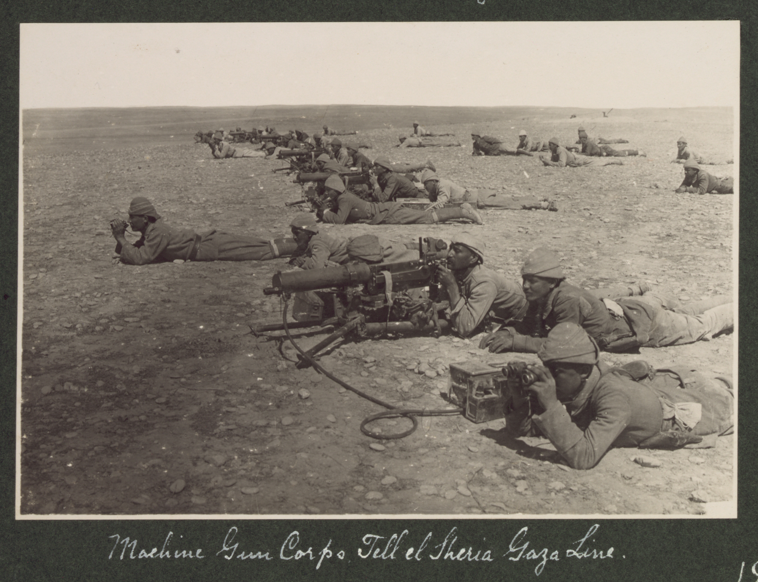 Machine Gun Corps Tell el Sheria Gaza Line